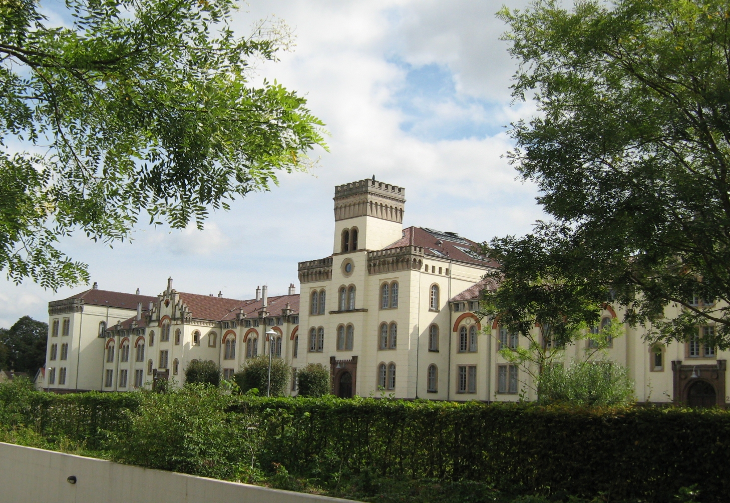 Thiepval-Kaserne Tübingen